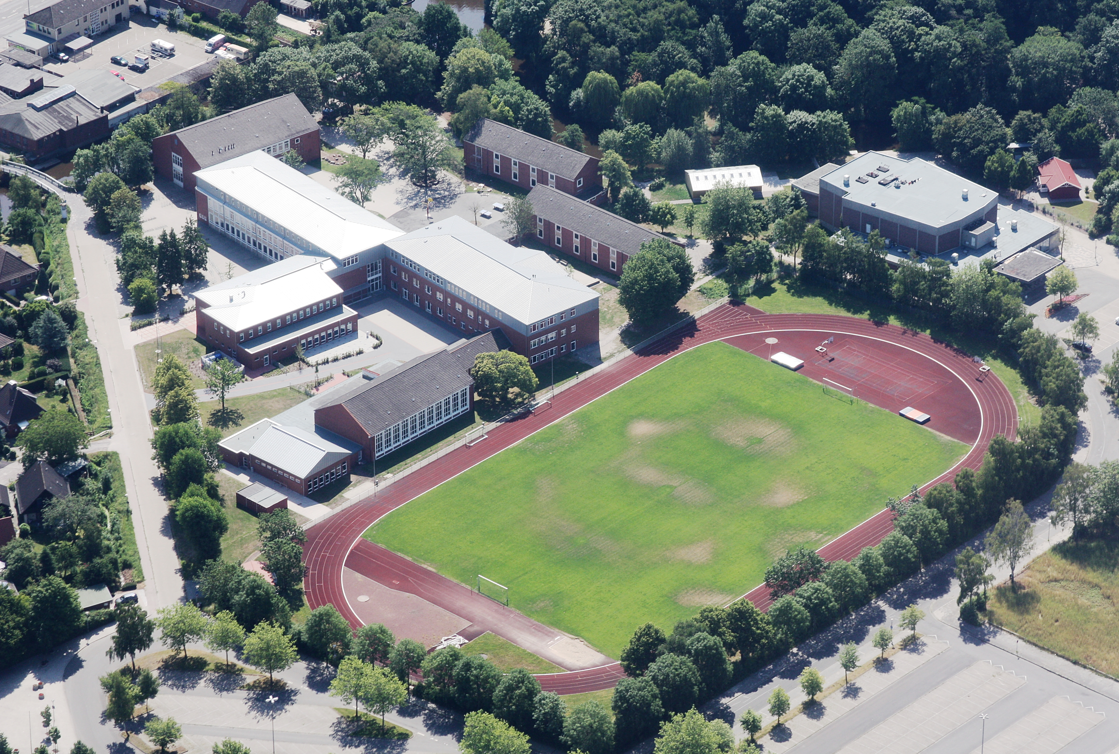 Flug über Emden; Flughöhe 1500 ft; Juli 2010; Originalfoto bearbeitet: Tonwertkorrektur und Bild geschärft mit Hochpassfilter